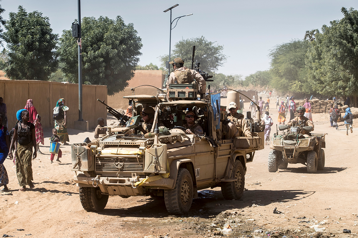 Zondag 30 januari. Broeierig, heet, stoffig. Hartje Gao. De eerste uitgestegen patrouille van Task Group Desert Falcon loopt kriskras door het centrum. Beréden had de eenheid al vaker haar gezicht laten zien, maar dit is een scoop. De bevolking toont zich verheugd – of die Nederlandse militairen dat niet vaker willen doen, want dit is goed voor hun stad. Ons mediateam volgt de luchtmobiele infanteristen van VN-missie MINUSMA op de voet. Desert Falcon begint zijn patrouille op een markant punt. Reed het voertuigenpakket net al vlak langs de locatie van de verschrikkelijke aanslag (op 18 januari ontplofte in Gao een bomauto en eiste bijna 80 doden en 120 gewonden, red.), nu staat de eenheid naast het Vredesplein geparkeerd. Die naam is enigszins bedrieglijk. “Hier hakte het sharia-bewind een paar jaar geleden toch nog handen van dieven af?”, zegt een korporaal die van een van de tonners springt.